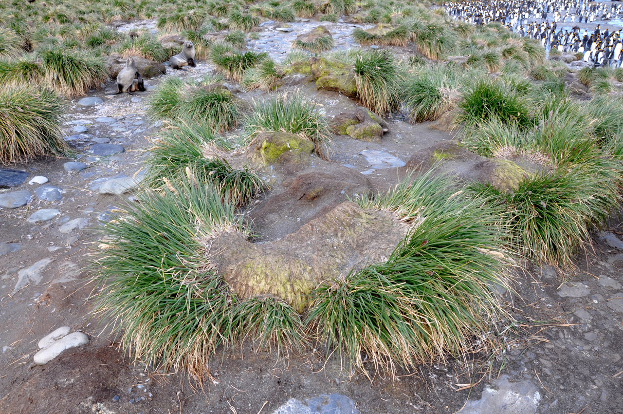 Tussac (poa flbellata) en Georgie du Sud (érosion par les nombreuses colonies présentes)